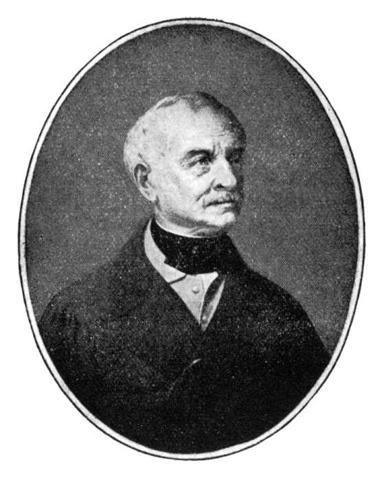 Joseph